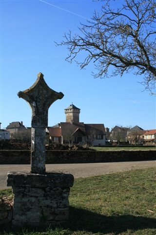 croix en pierre du XI°siècle